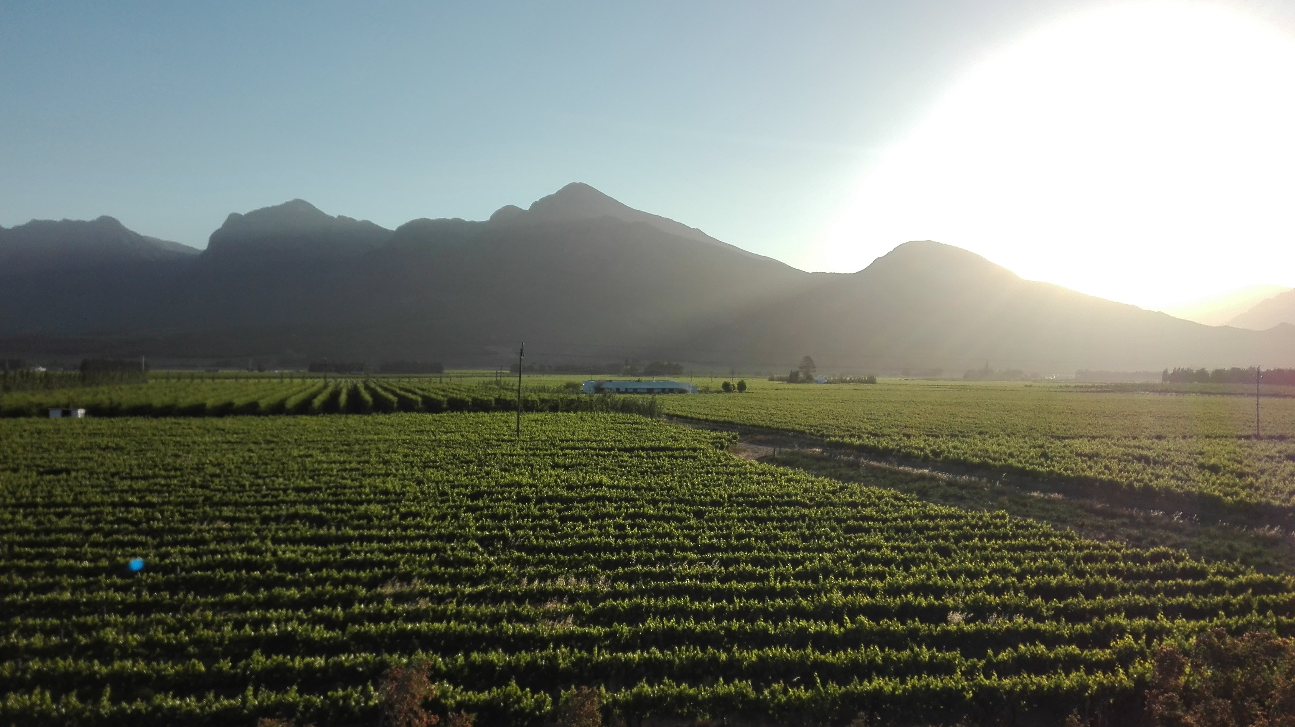 Wingerd in die Breedekloof